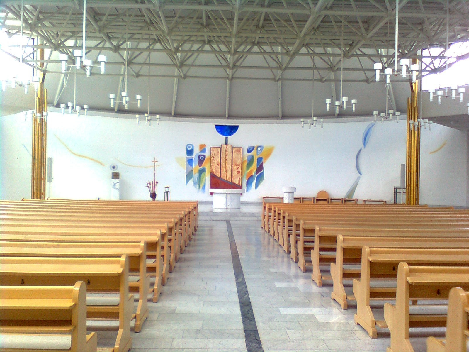 Innenraum der Grazer Schutzengelkirche Kurt Zisler: Christus als Mittler zwischen Gott und den Menschen, Engel. 1996. Altarwand. Manfred Gollowitsch: Hauptaltar, Ambo, Taufbecken. 1994